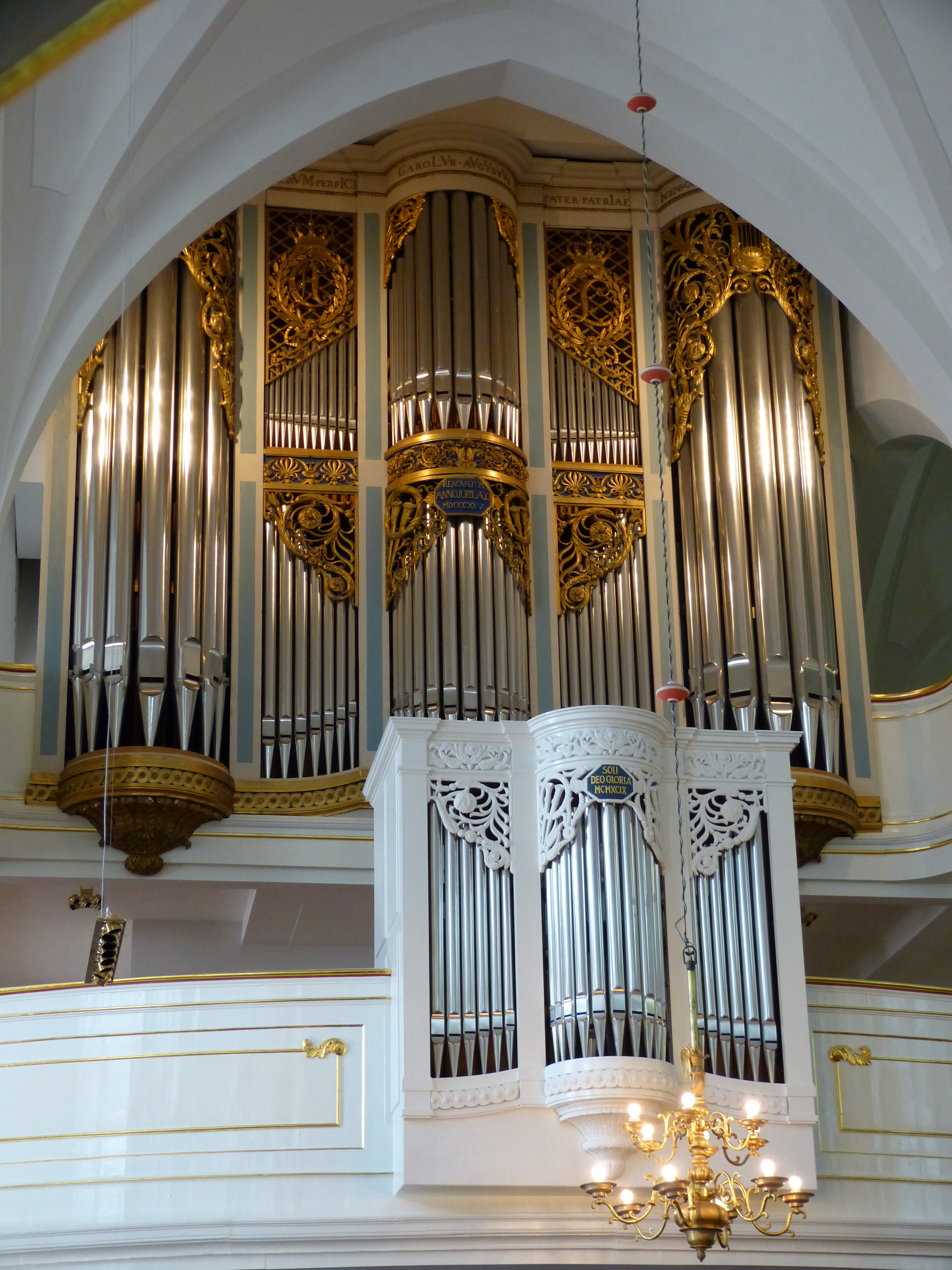 Orgel Herderkirche Weimar (Stadtkirche St. Peter und Paul)